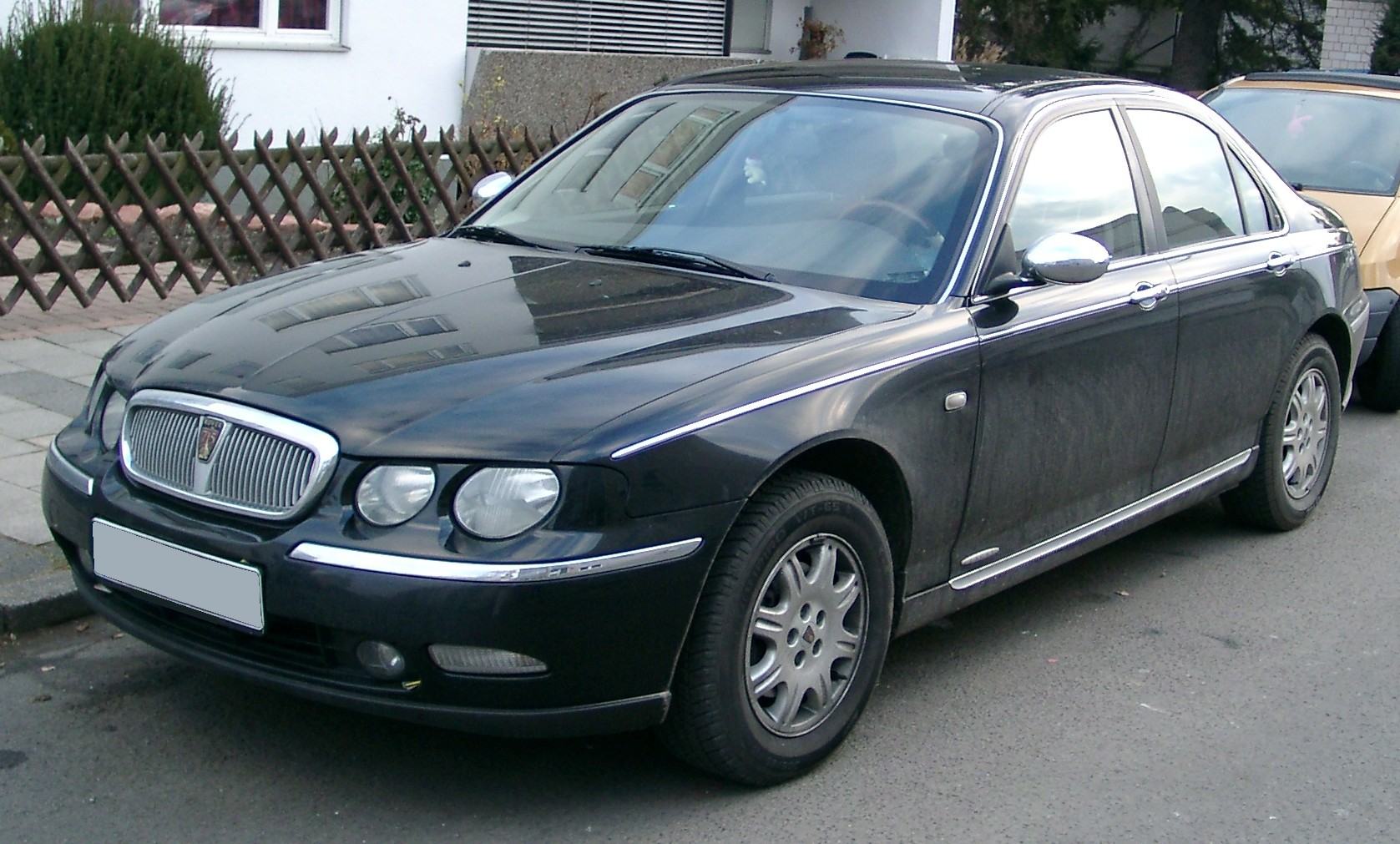 Rover 75